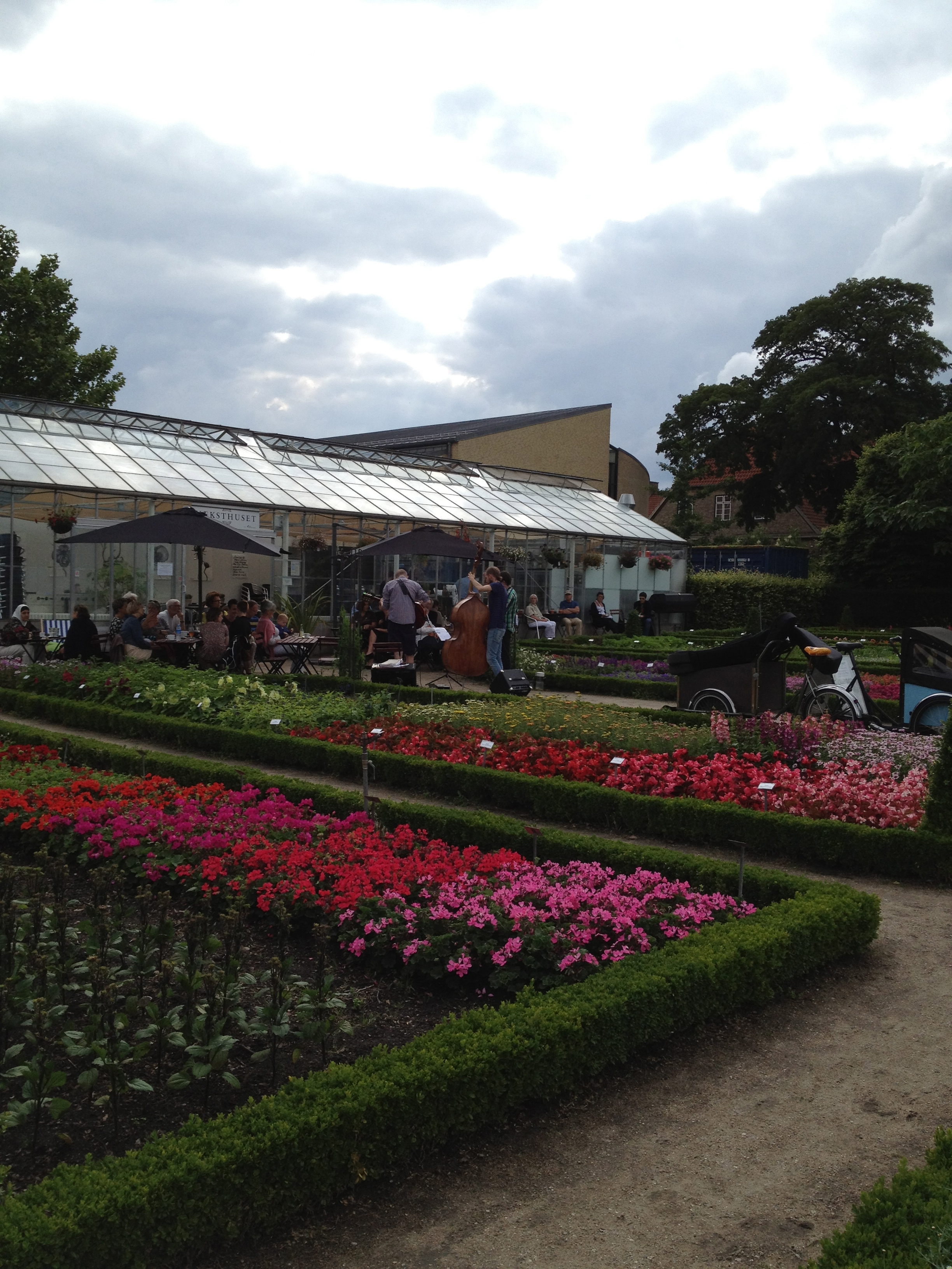 At the University Gardens in Frederiksberg - Landbohøjskolens Have.